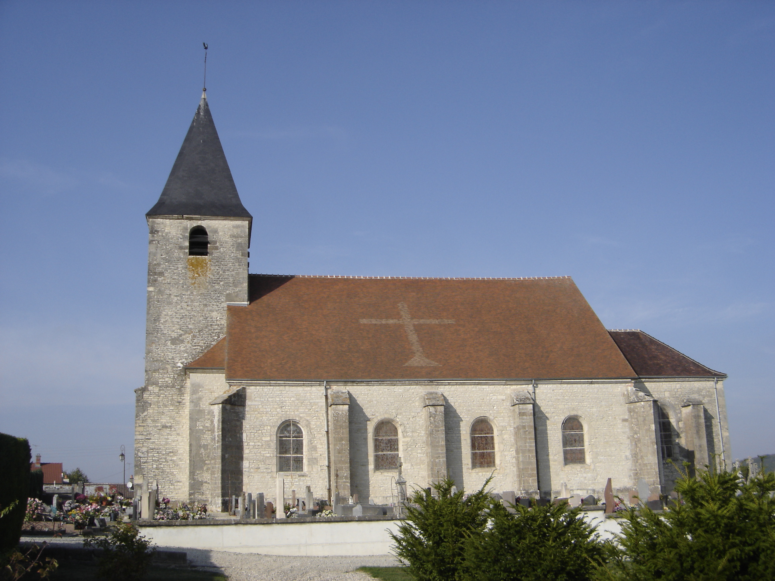 église de Ville-sous-la-Ferté (Aube, France)